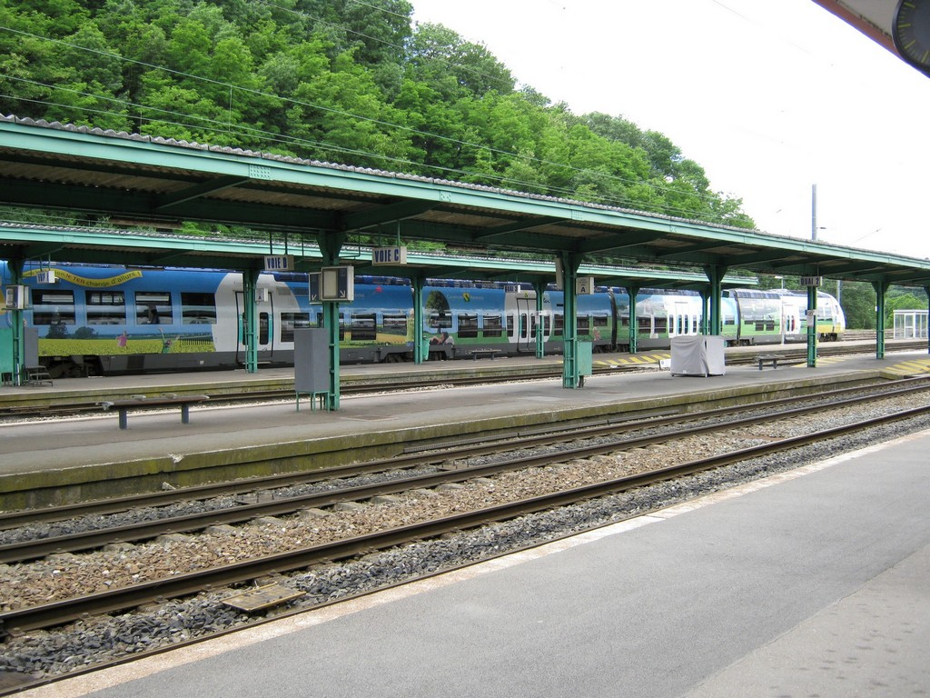 Gare de Chalindrey TER a quai